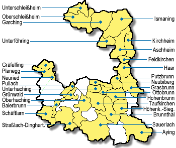 Lage der Gemeinden im Landkreis München